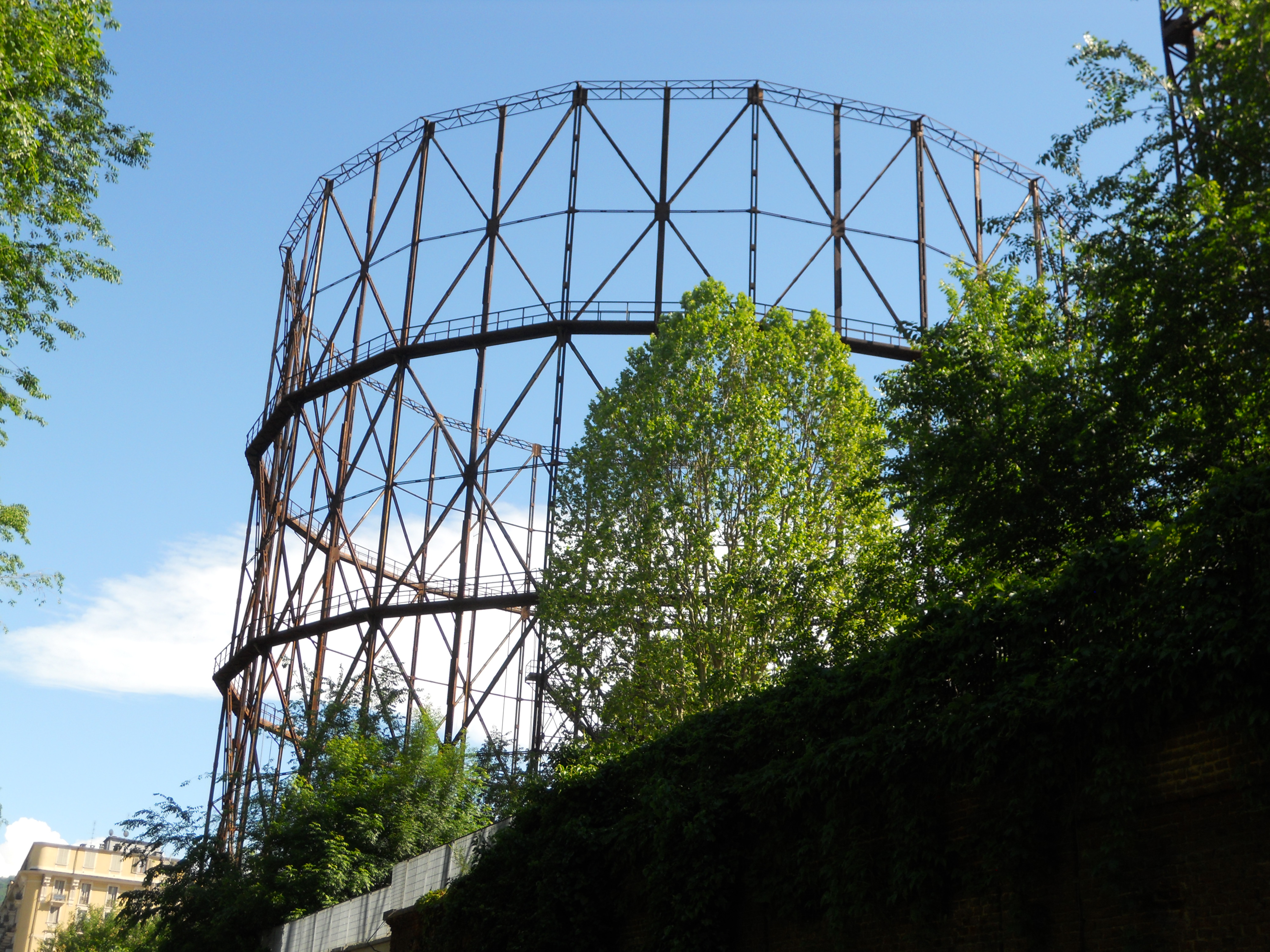 Struttura residua del gasometro nell'area Italgas